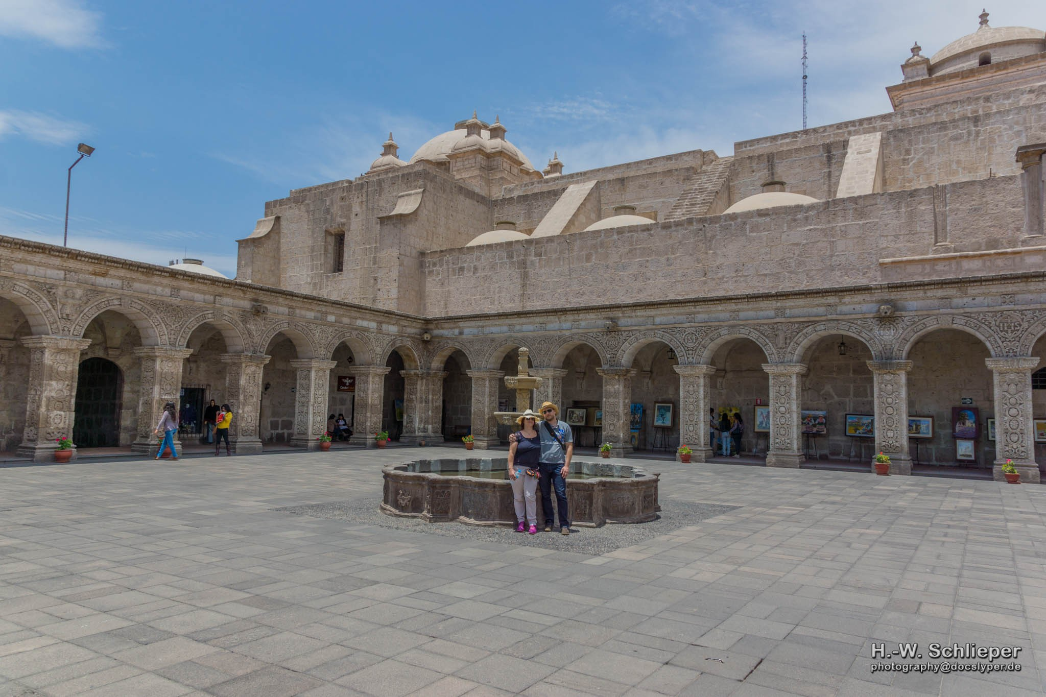 492 Arequipa